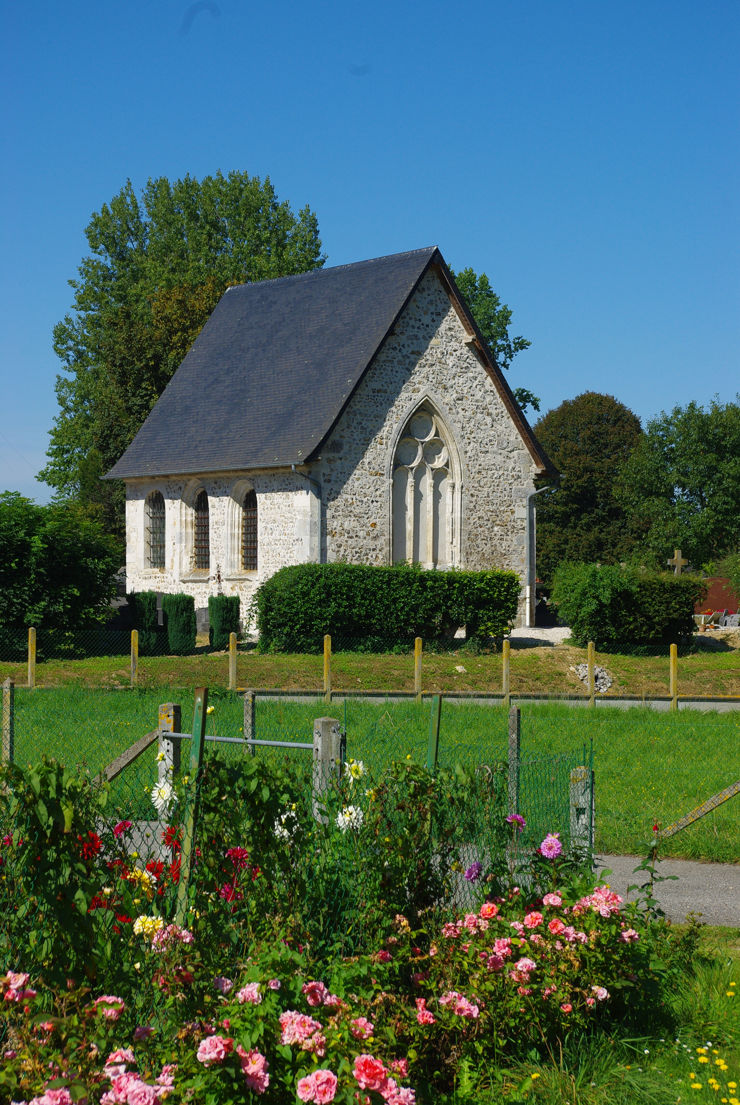 Chapelle du Fay, à Sainte-Marie-des-Champs (Seine-Maritime, France) .